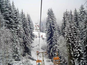 Pârtia Dealul Negru iarna